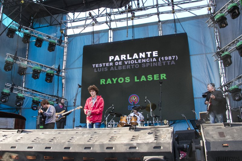 Rayos Laser - "Spinetta y el lenguaje del cielo”, en Tecnópolis. sábado 12 de abril de 2014